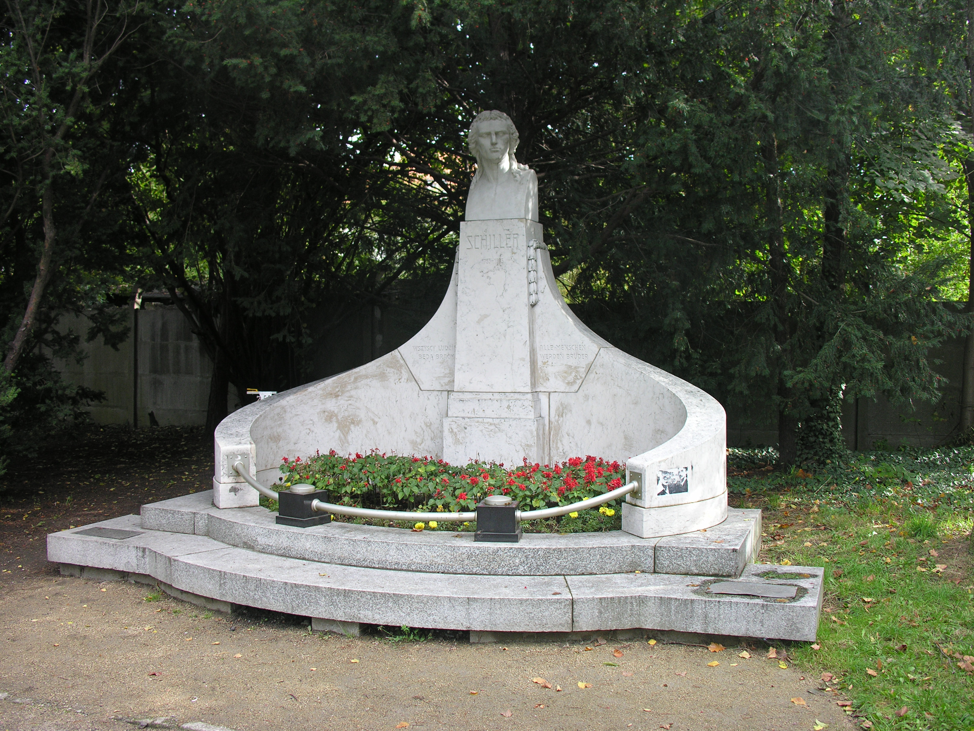 Pomnik Schillera we Wrocławiu. Park Szczytnicki, ul. Kopernika